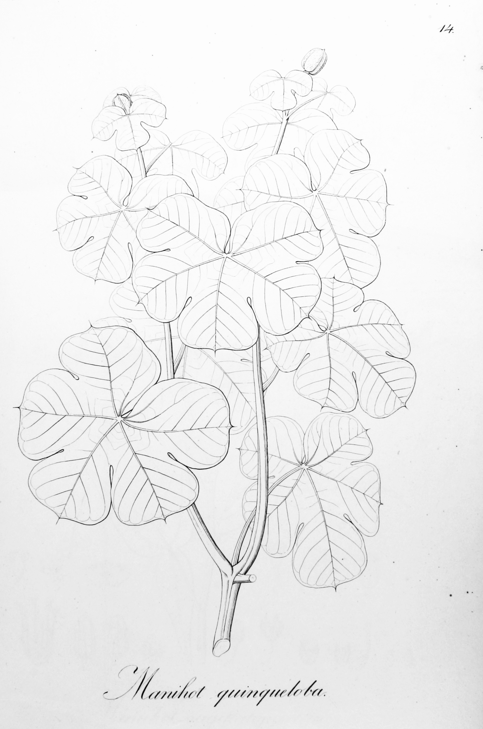 Manihot quinqueloba Plate from book